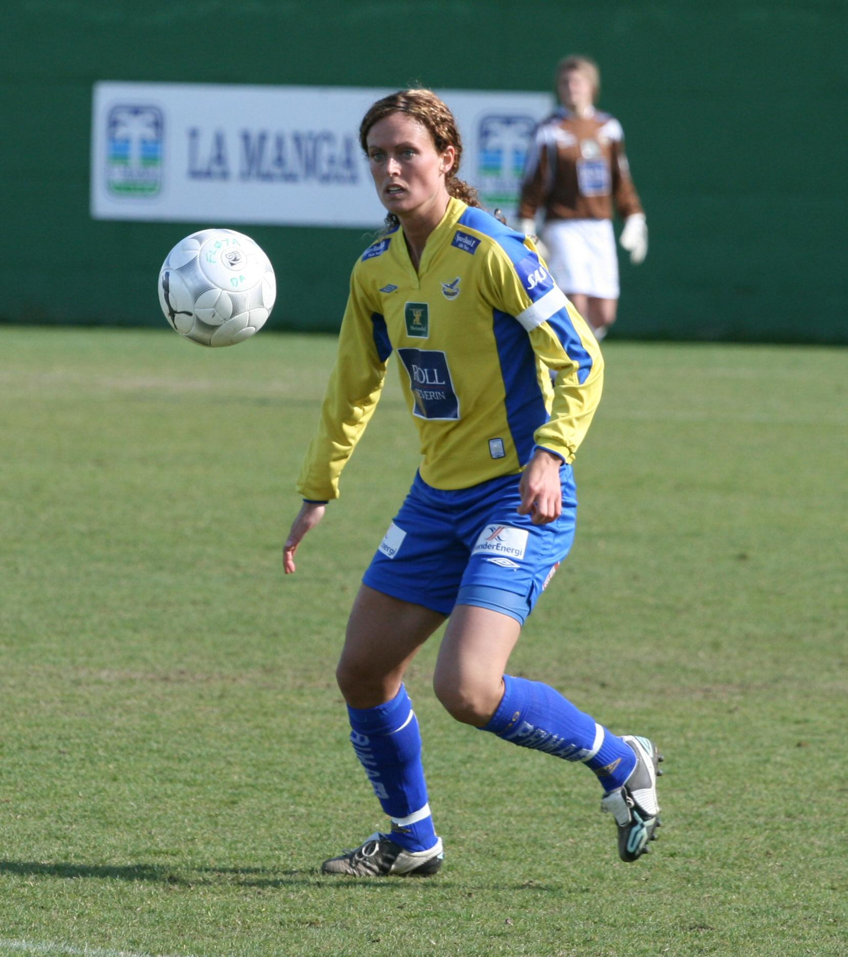 Fotballspilleren Solfrid Andersen